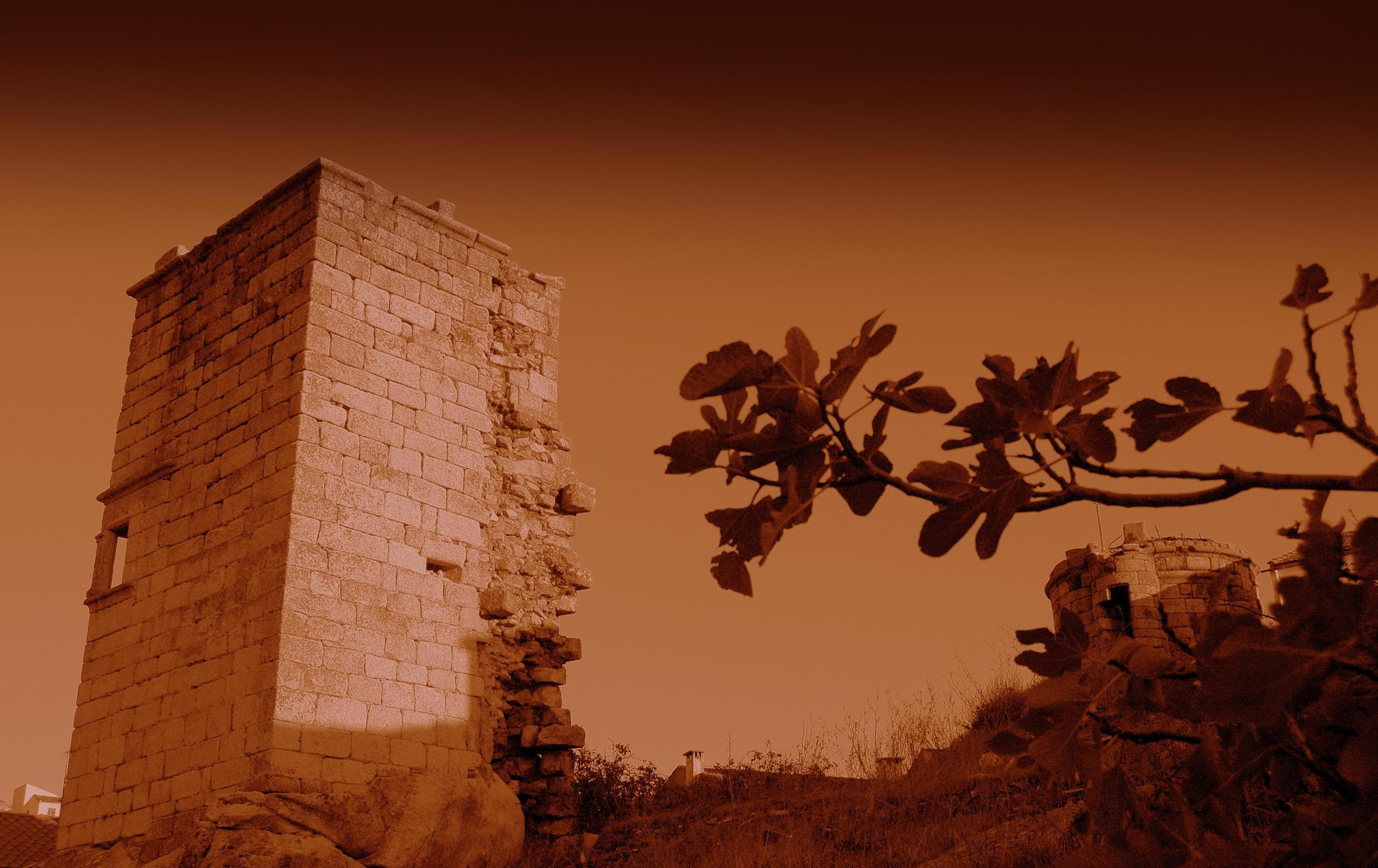 Castillo de Eljas, en Cáceres (España)